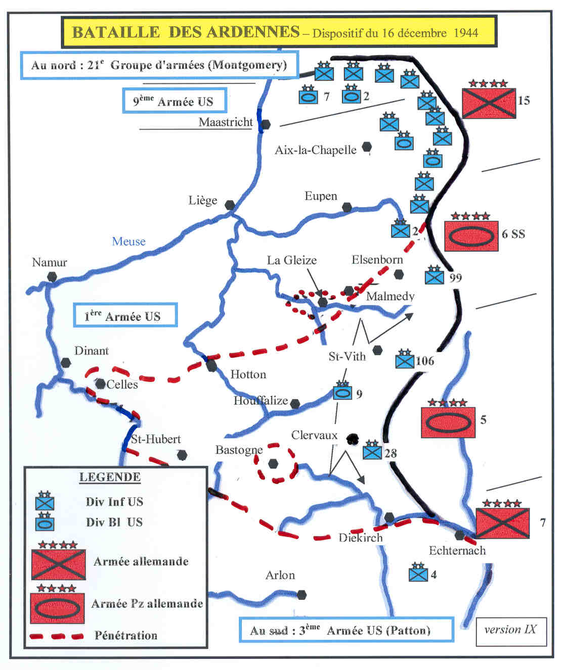 Description : Plan personnel bataille des Ardennes Auteur de l'image : Fistos Licence : domaine public But : remplacer BatAIX.png pour améliorer la lisibilité